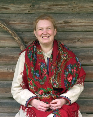 Kauksi Ülle oma aida trepil